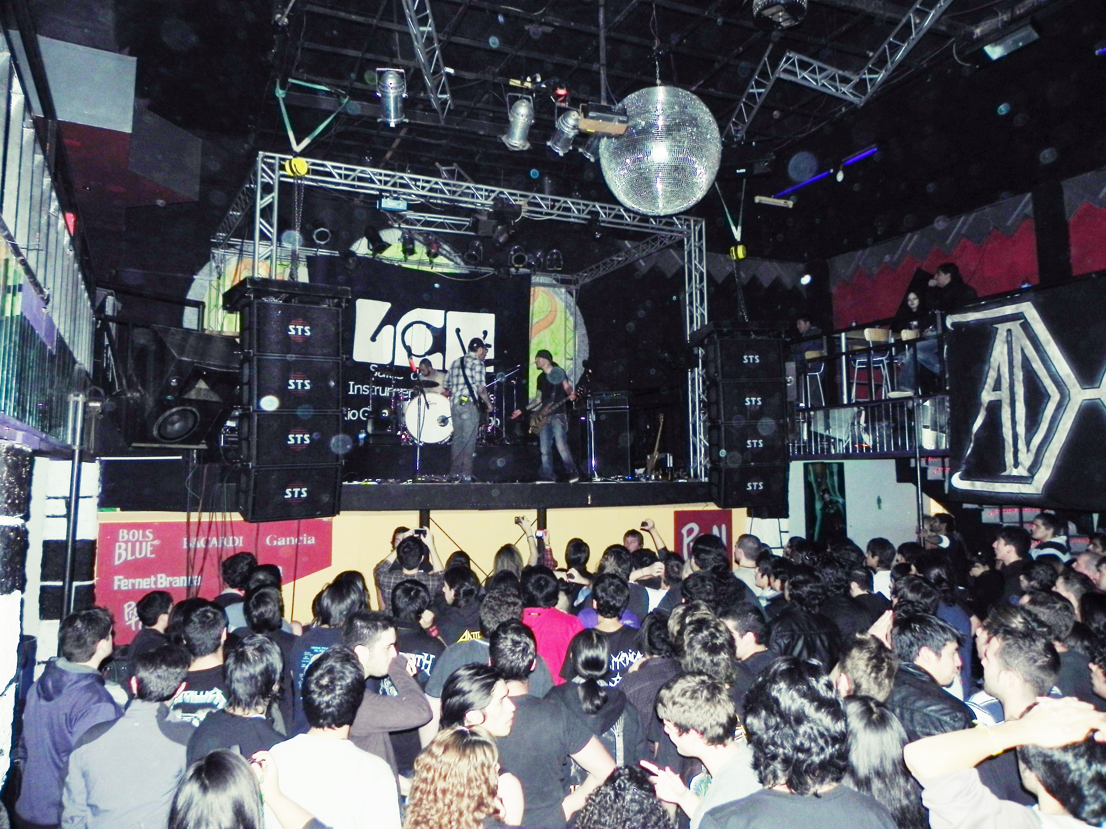 Carajo en una presentacion en Rio Grande, Tierra del Fuego en Marzo de 2012